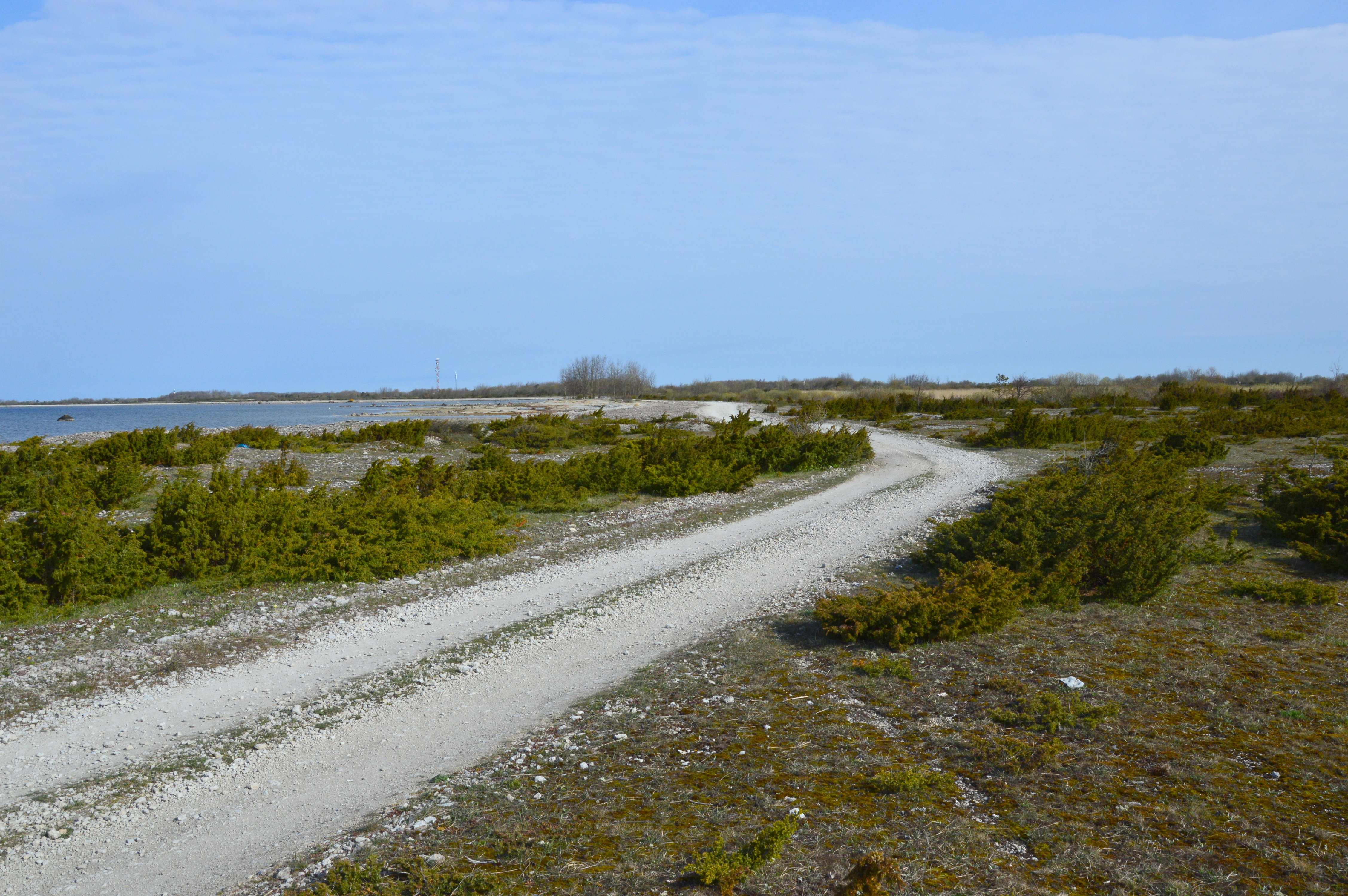 Kruusatee Osmussaarel.